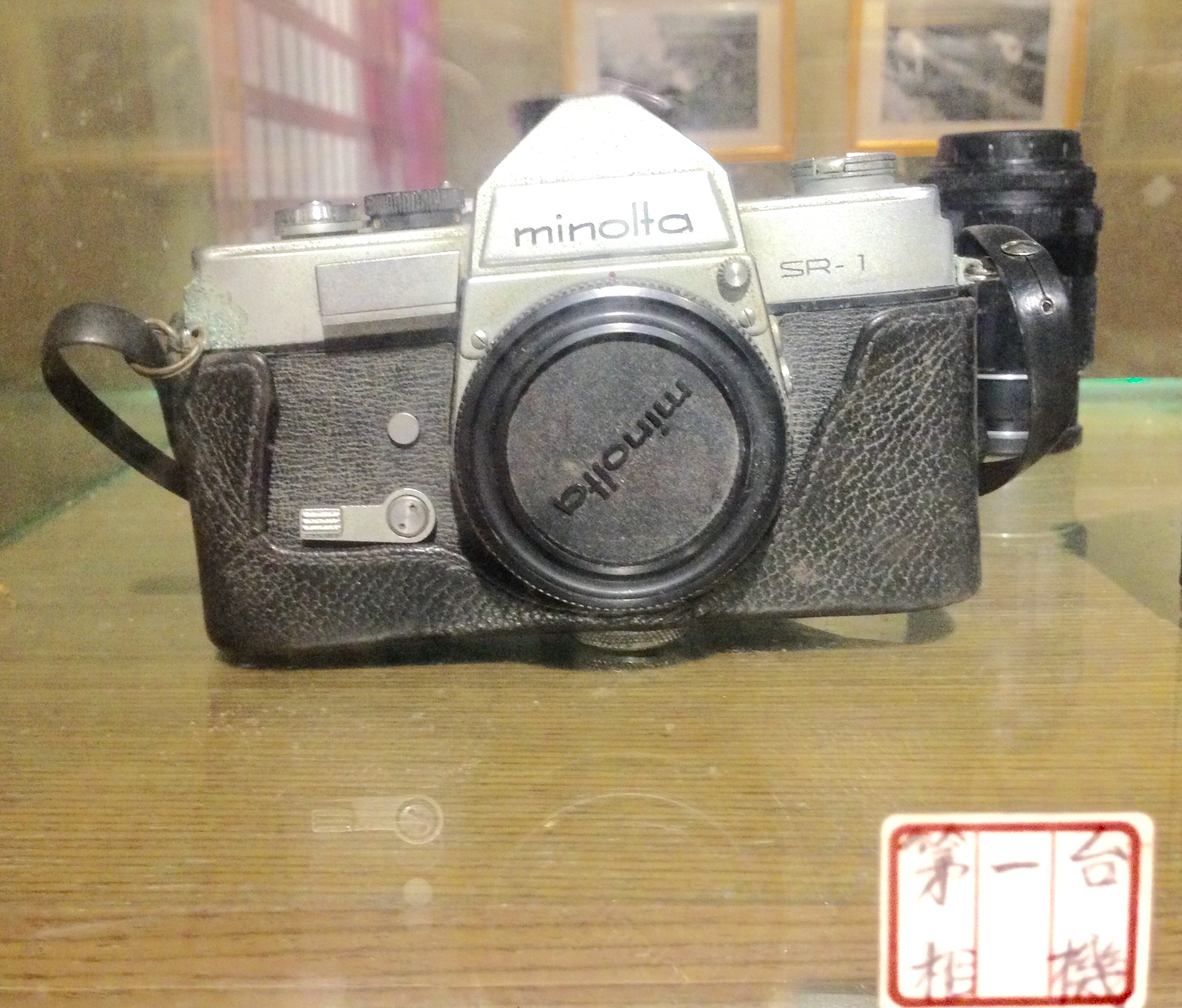 中文（台灣）: 李秀雲擁有的第一台相機Minolta SR-1